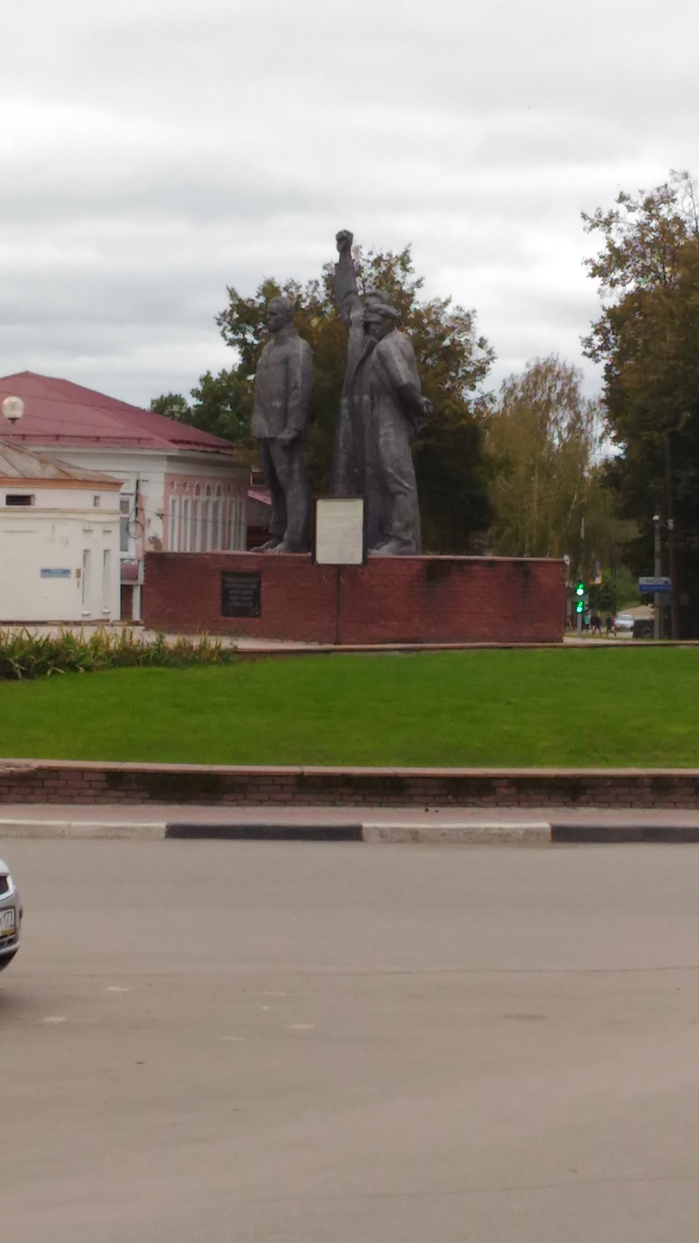 Город Семёнов. Площадь Октябрьской революции. Памятник трем коммунистам, погибшим в 1919 году в схватке с бандитами-контреволюционистами, прятавшимися в лесах возле деревни Ольеньево. (1979 г.)